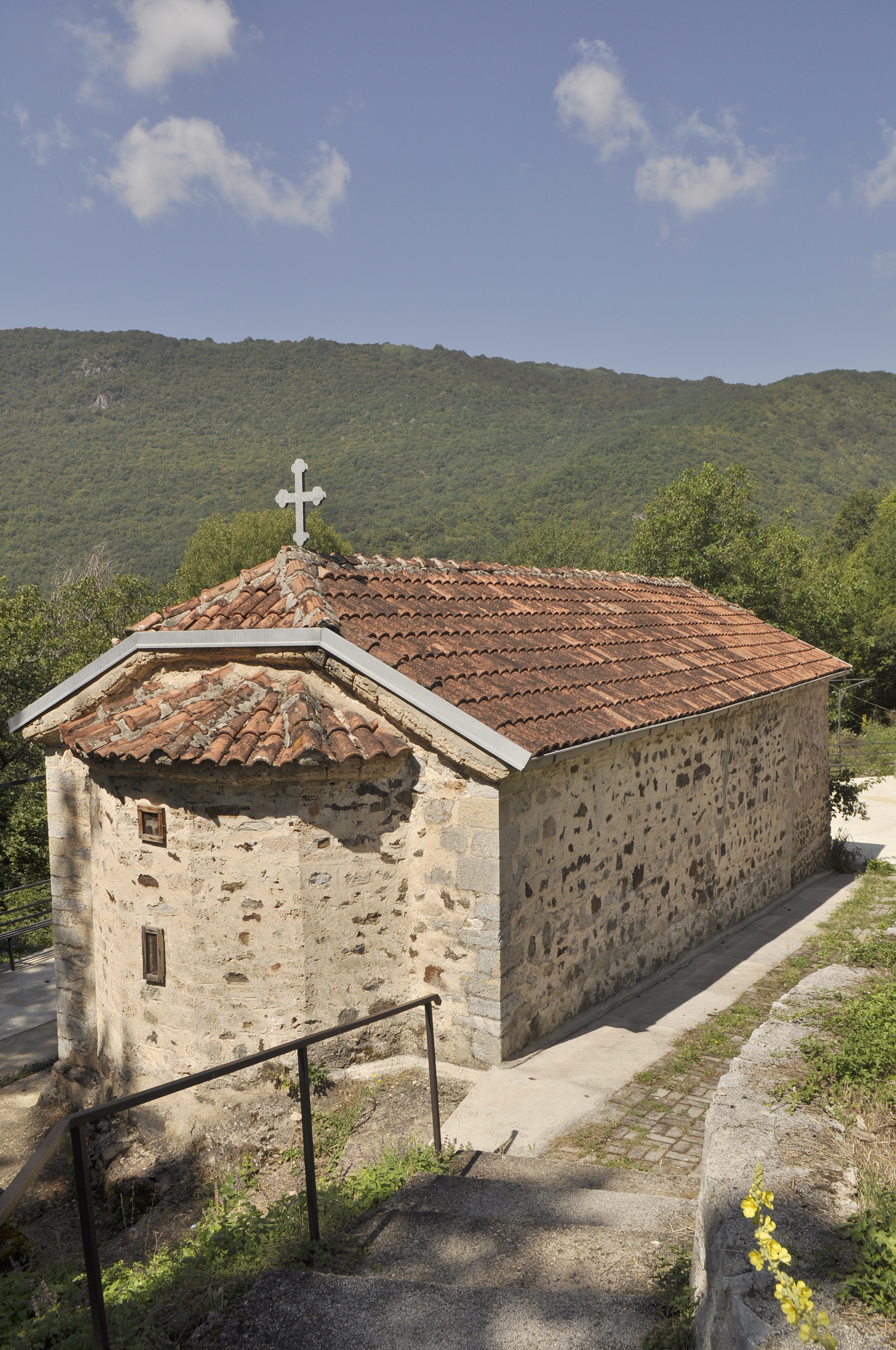 Црквата Света Богородица, Збажди 2016, Малесија, на планината Караорман